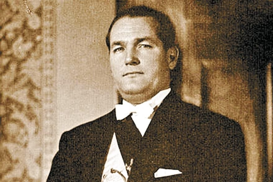 Juan José Arévalo Bermejo, presidente constitucional de la República de Guatemala (1945-1951)